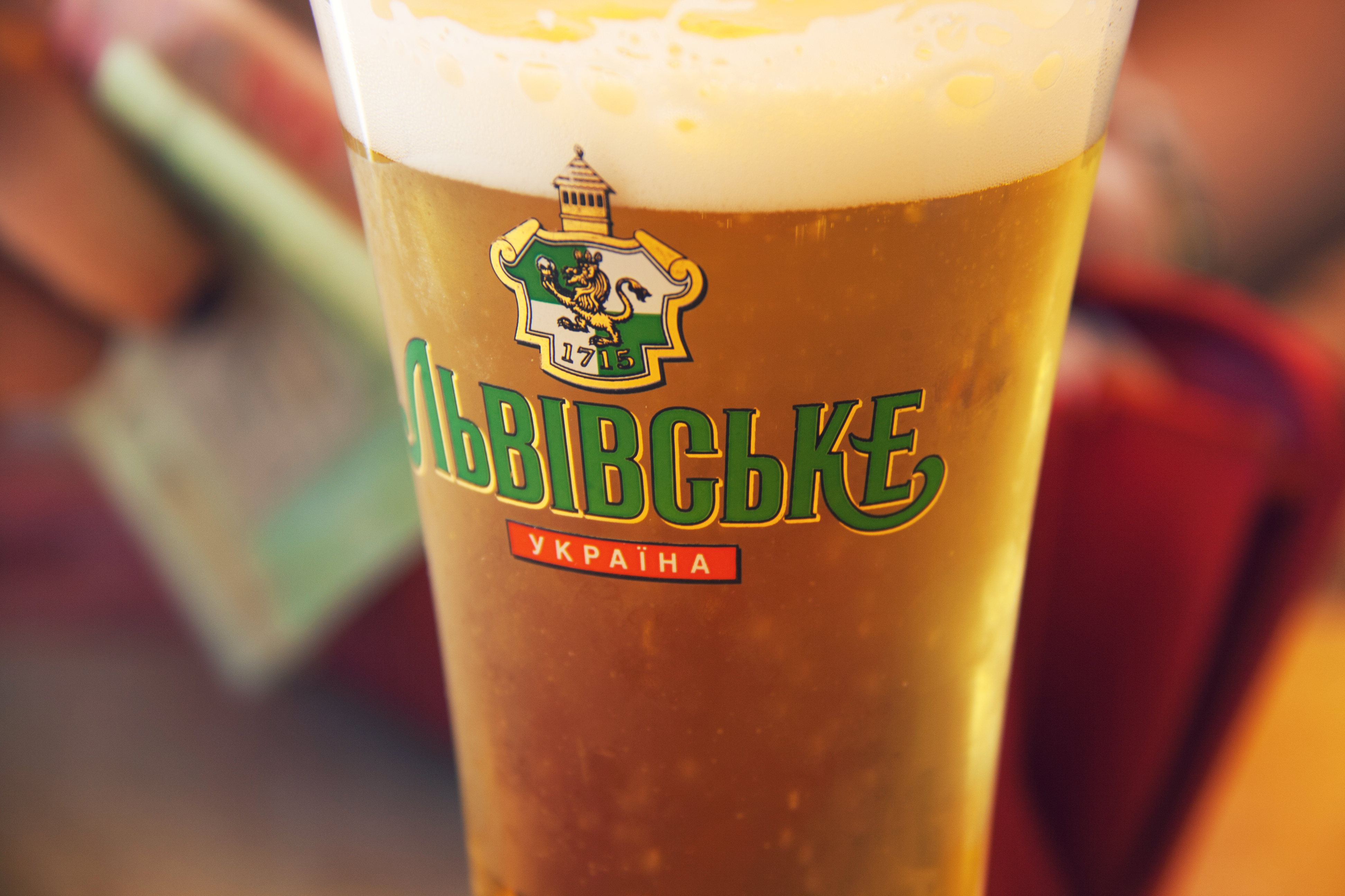 Kiev, Ucrania